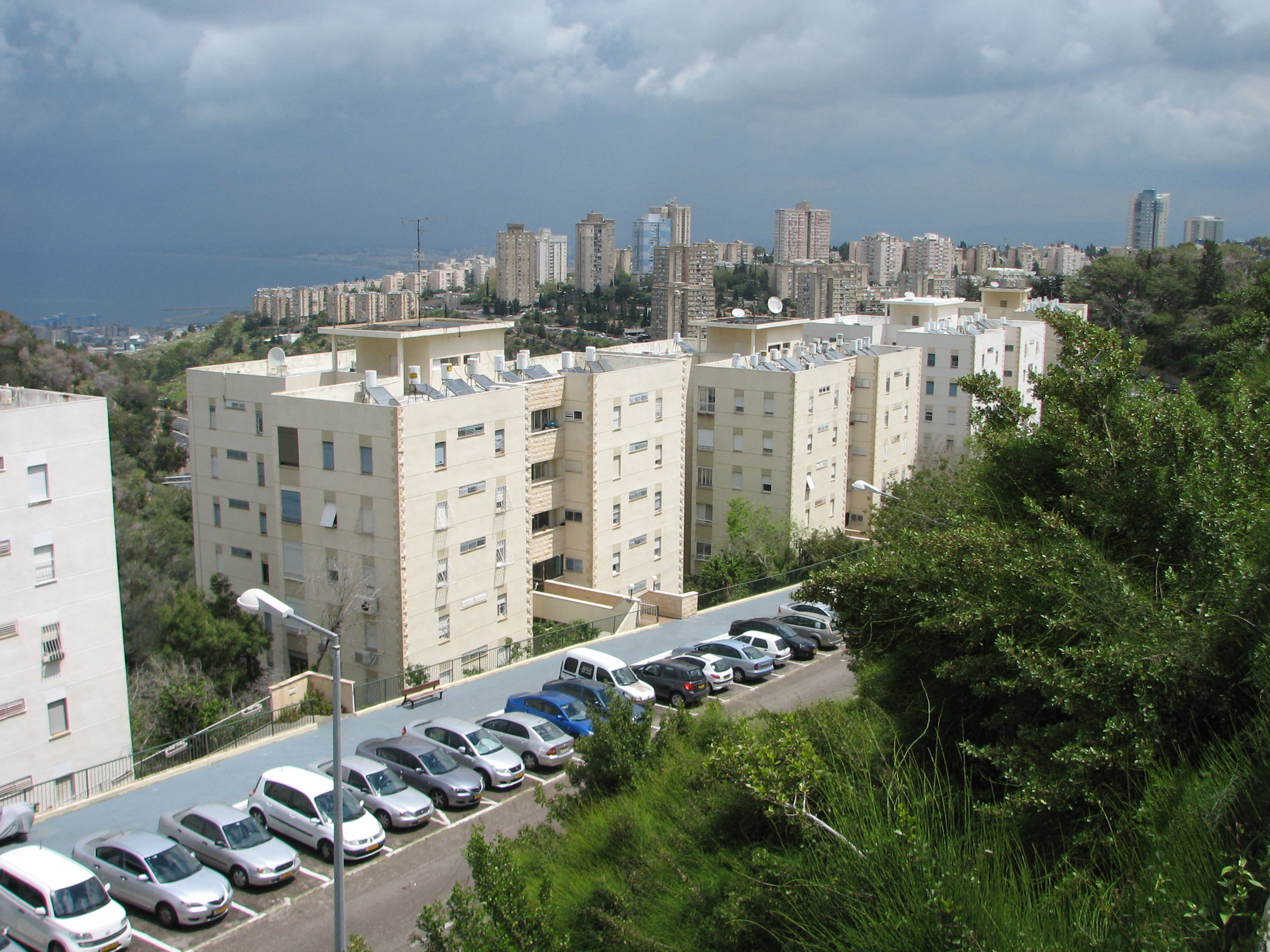 Old Romema Neighborhood, Haifa Israel שכונה בחיפה מצפון לשכונת אחוזה, נוסדה בשנת 1946 על ידי ועד הדר הכרמל על אדמות שנרכשו בשנות העשרים של המאה העשרים על ידי חברת הכשרת הישוב רחוב קרן היסוד